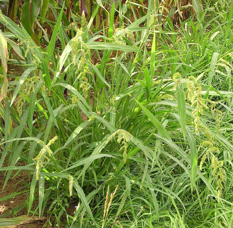 Echinochloa crus-galli am Rande eines Maisfeldes bei Neuss (in Deutschland).